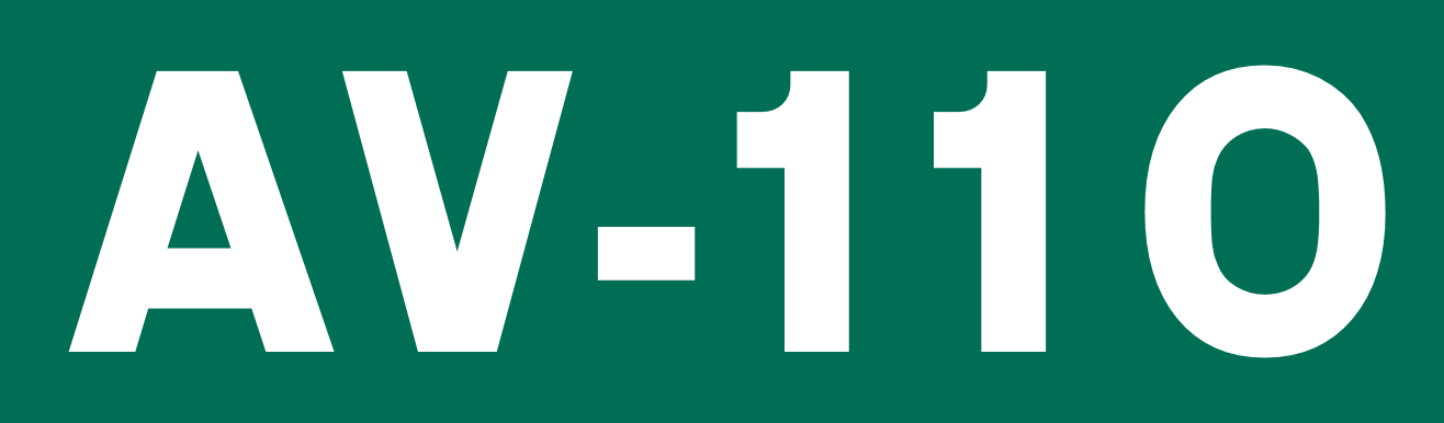 Cajetín de la carretera autonómica AV-110